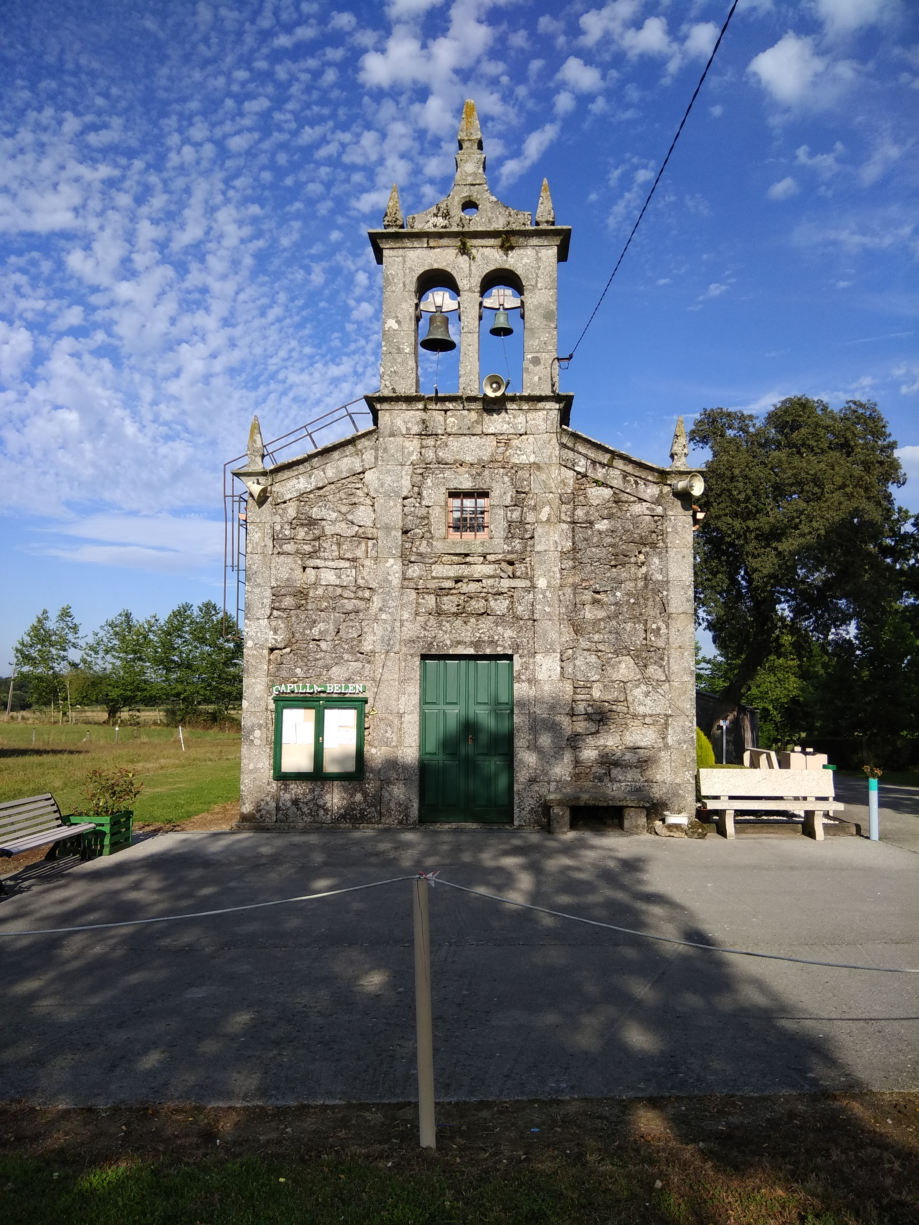 Igrexa de Belén, Rodeiro, Galiza.